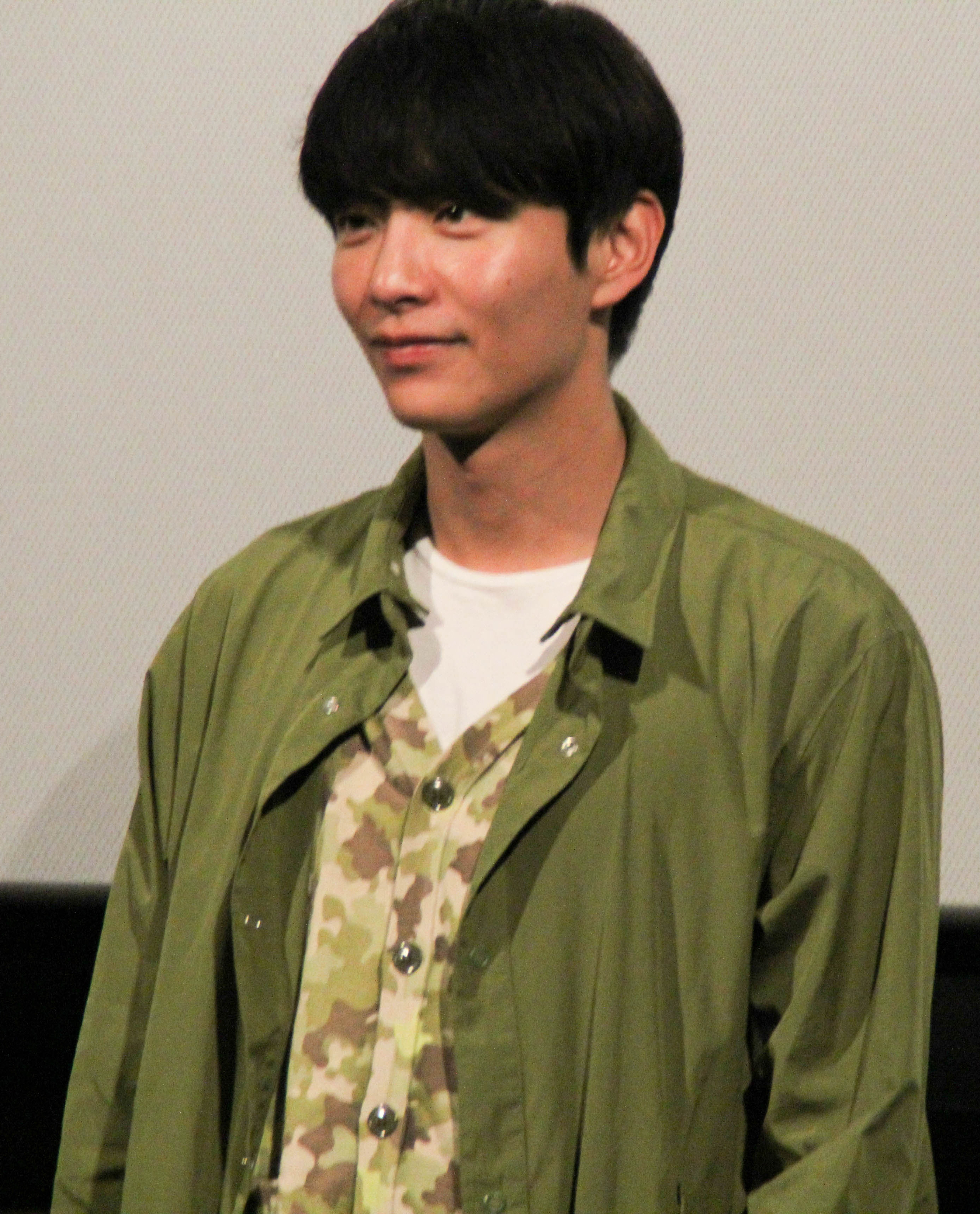 140322 몬스터 무대인사 Lee in 2014 at the premiere of Monster